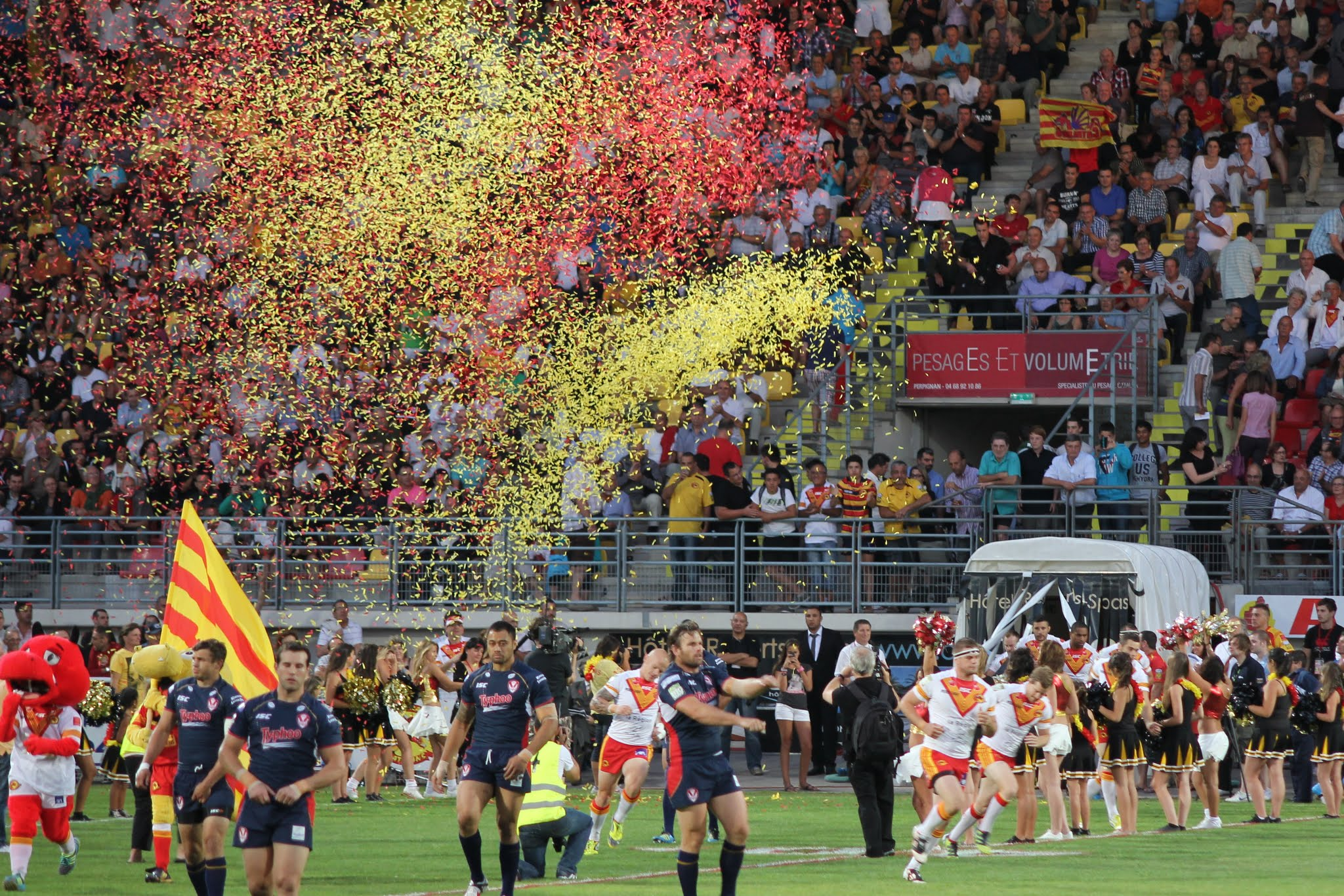 Entrée des joueurs lors du match Dragons Catalans - St Helens en 2013 au stade Gilbert Brutus de Perpignan.